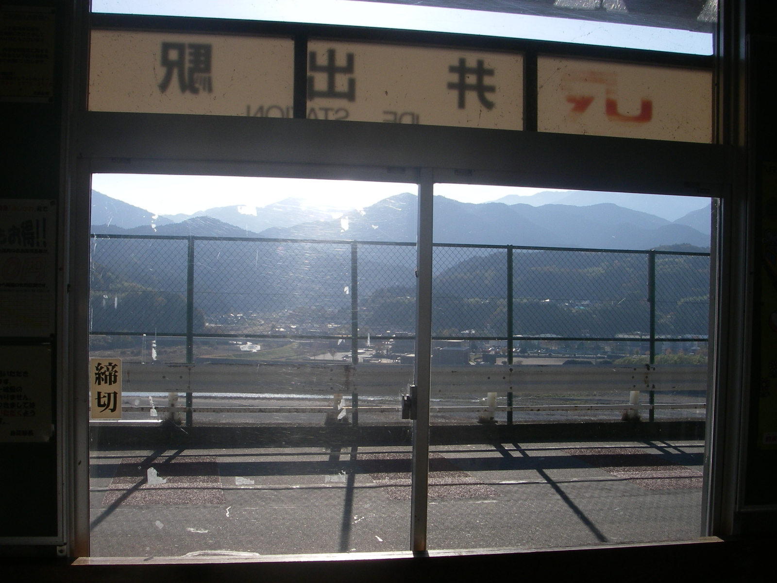 井出駅 待合室より